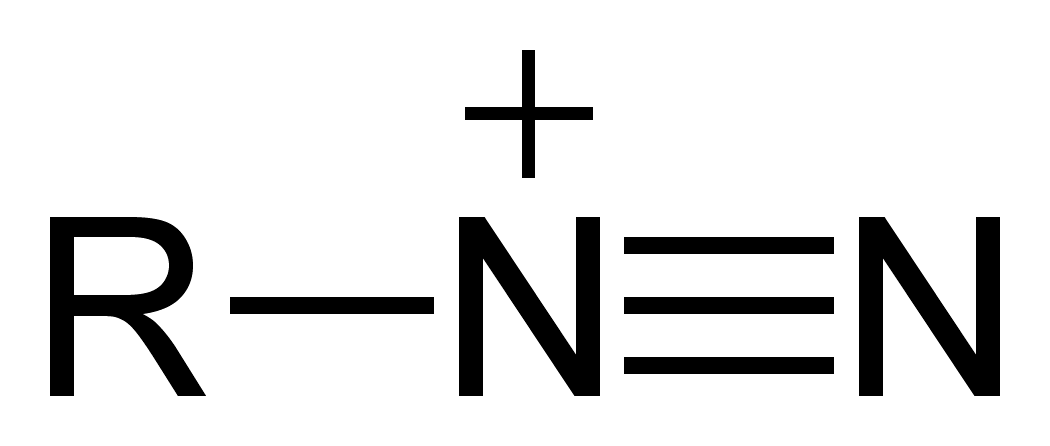 Diazonium ion